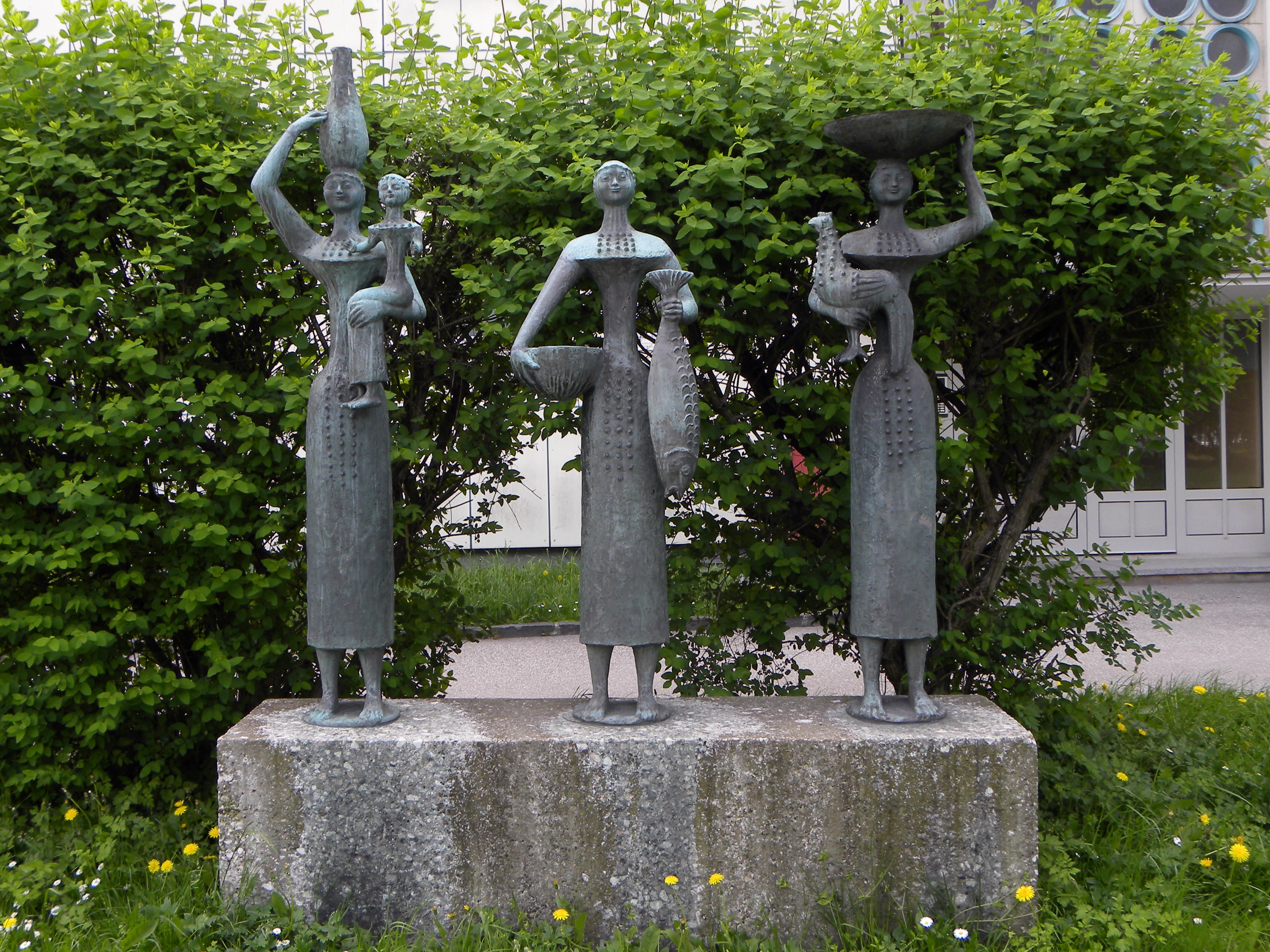 Drei Marktfrauen von Walter Ritter